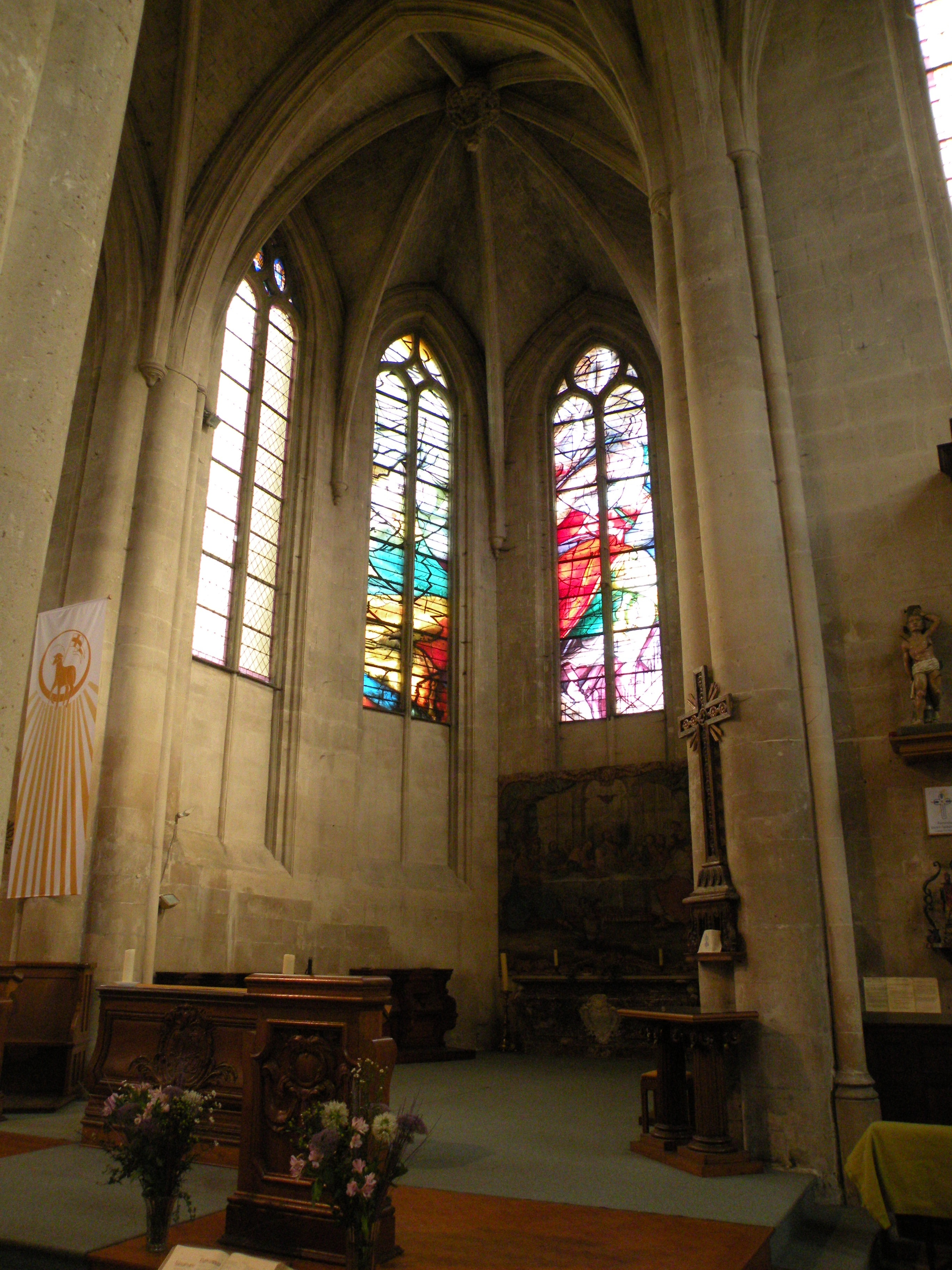 autel Église Saint-Denis, Crépy-en-Valois